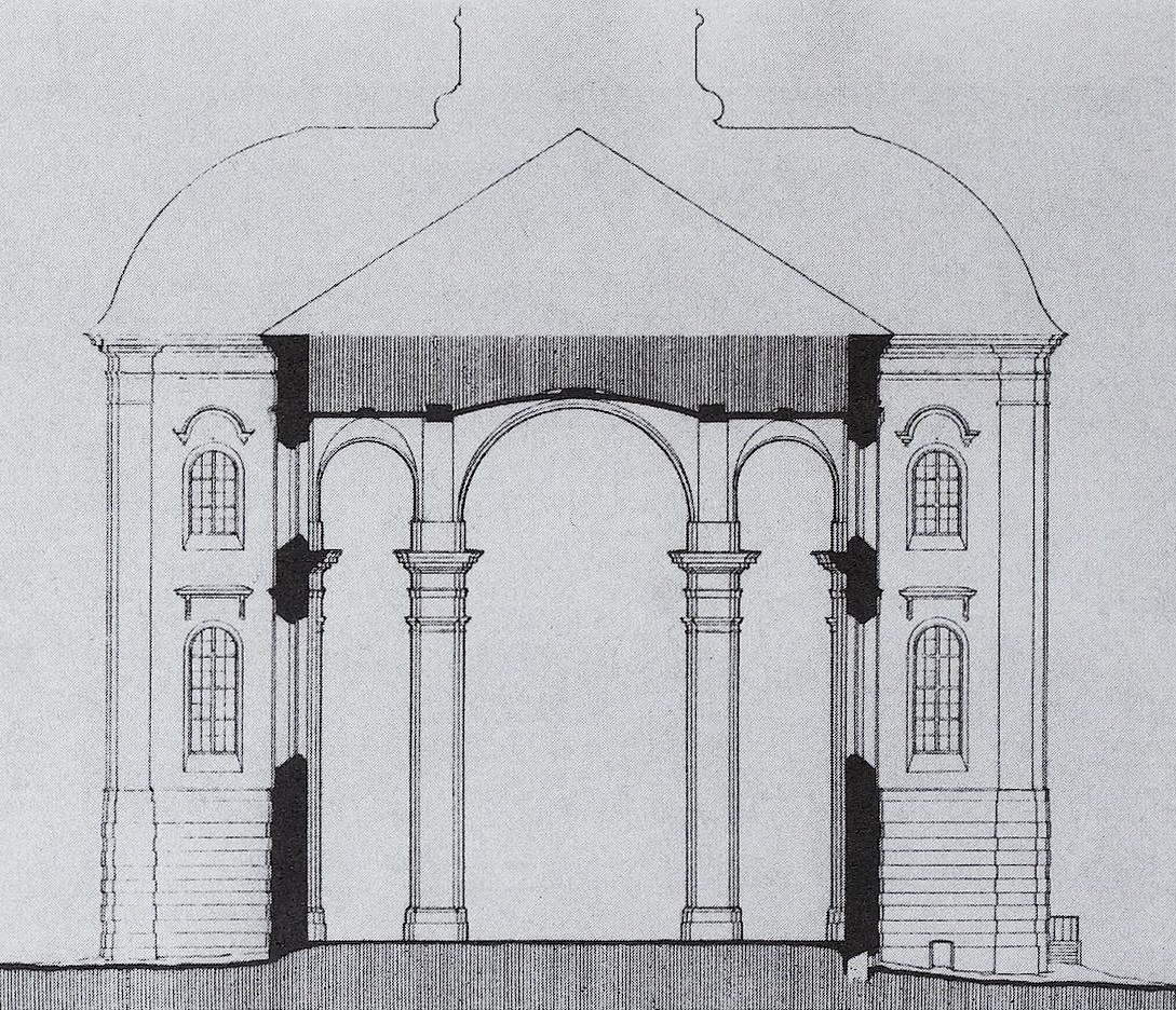 Беларуская (тарашкевіца): Пінск (Pinsk), пляц Рынак (plac Rynak). Сьвятога Станіслава і калегіюм езуітаў, абмеры